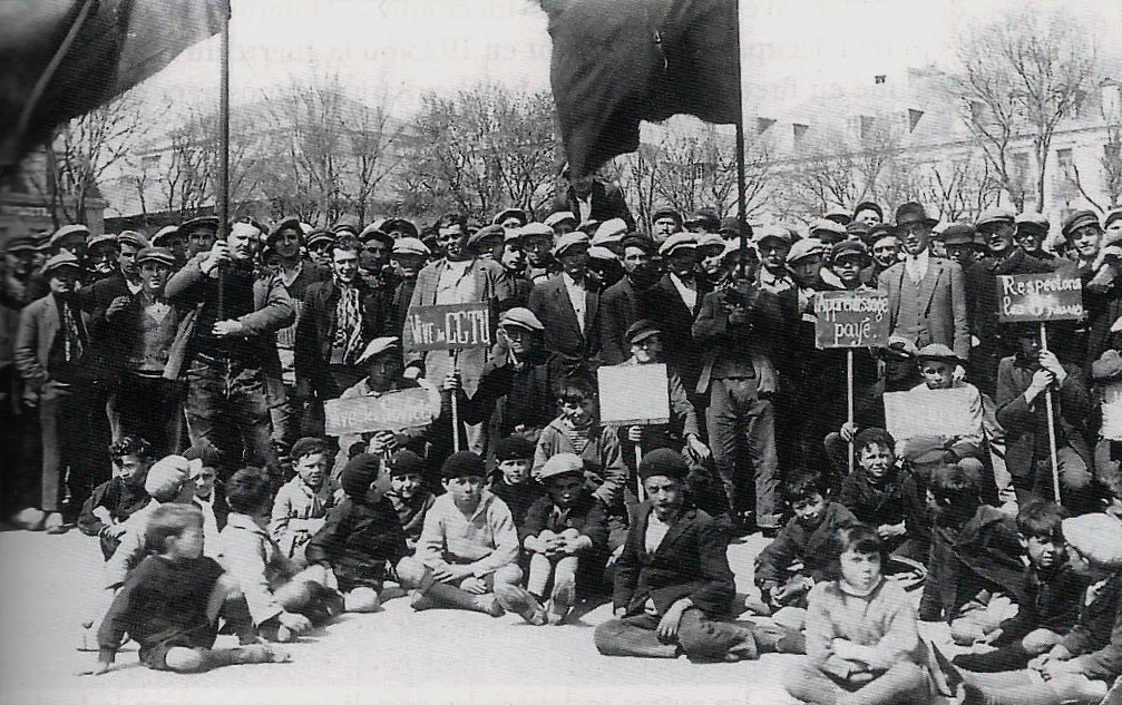 Concarneau : manifestation CGTU des ouvriers du bâtiment en 1929 (Pierre Guéguin, futur maire communiste de Concarneau est à droite sur la photo, portant un chapeau feutre)